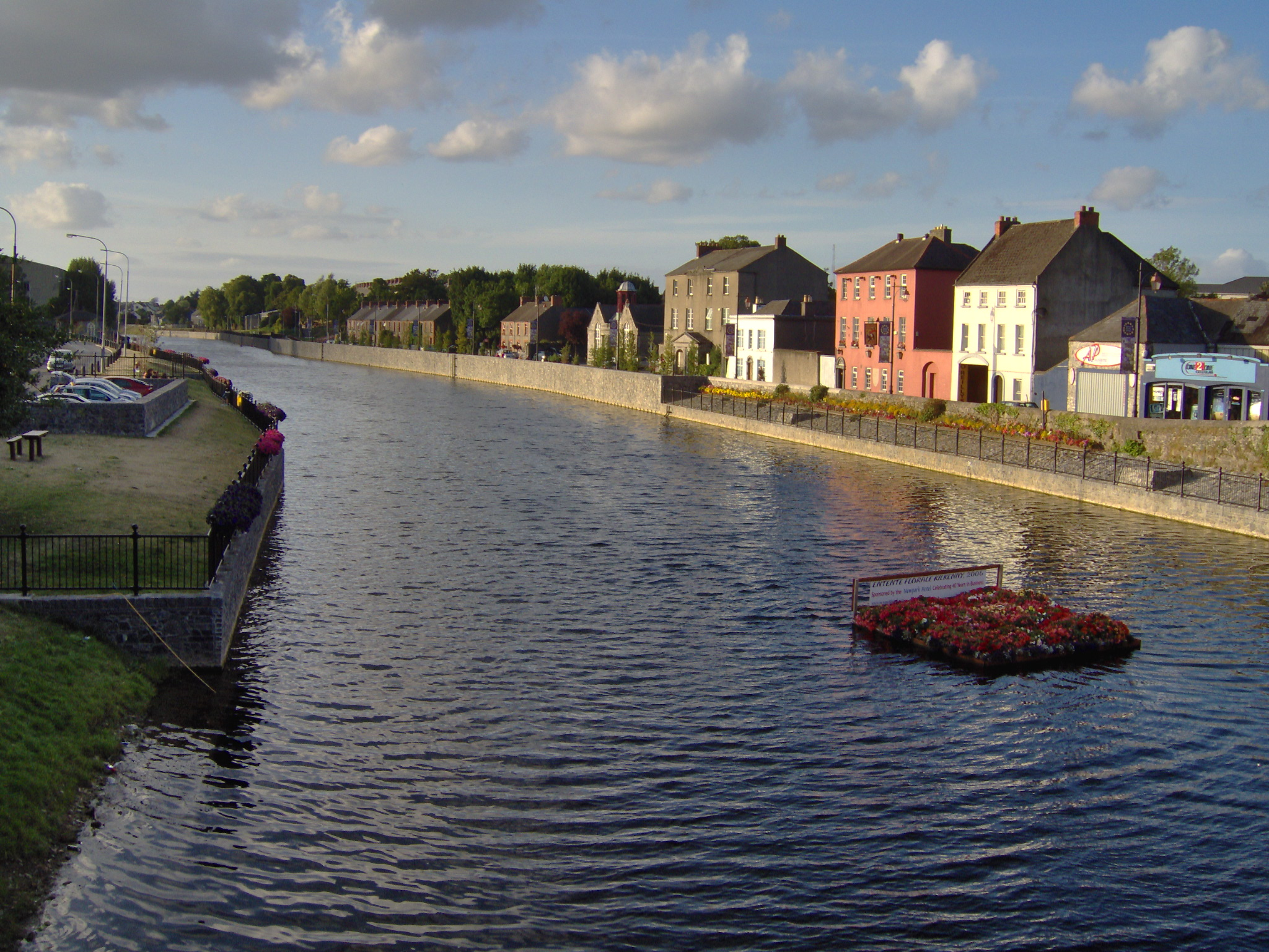 Kilkenny's river